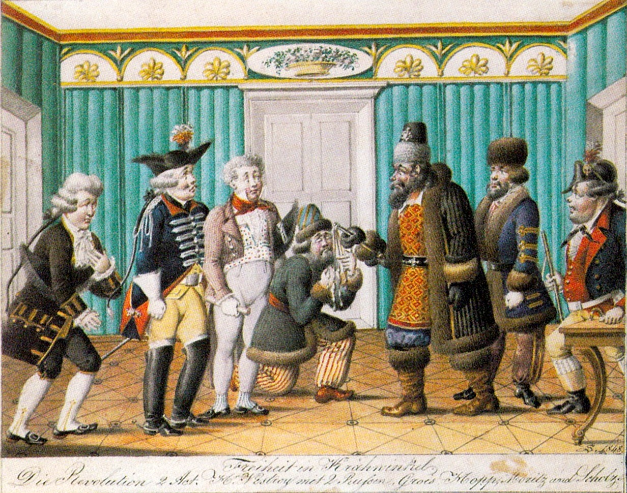 Szenenbild "Freiheit in Krähwinkel" (Die Revolution, 2. Act) mit Johann Nestroy als Eberhard Ultra (in Verkleidung als russischer Fürst), Heinrich Moritz als Rummelpuff, Johann Baptist Lang als Nachtwächter, Wenzel Scholz u. a. Aquarell, monogr. u. dat. "S. 1848".